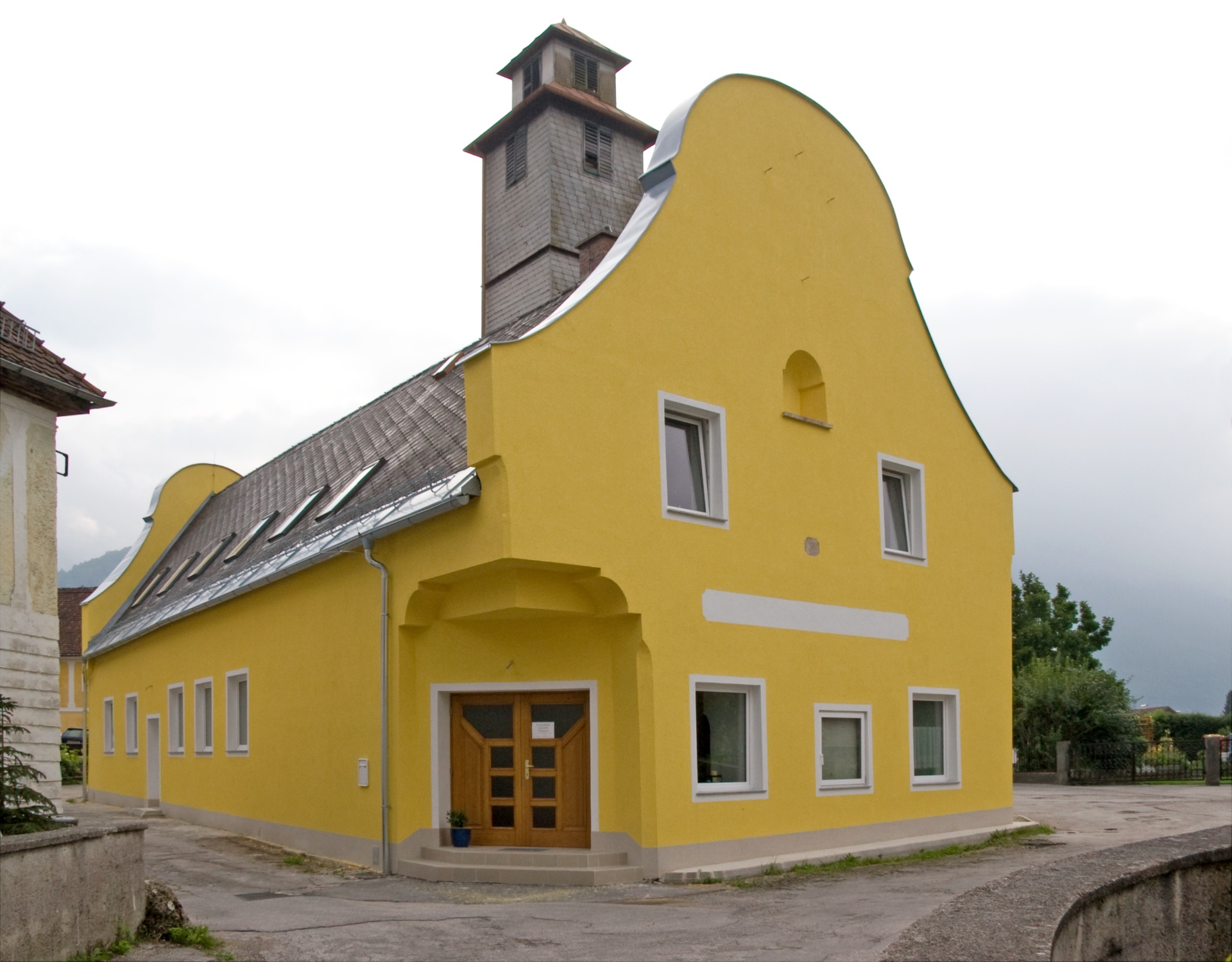 Ehem. Hammergebäude